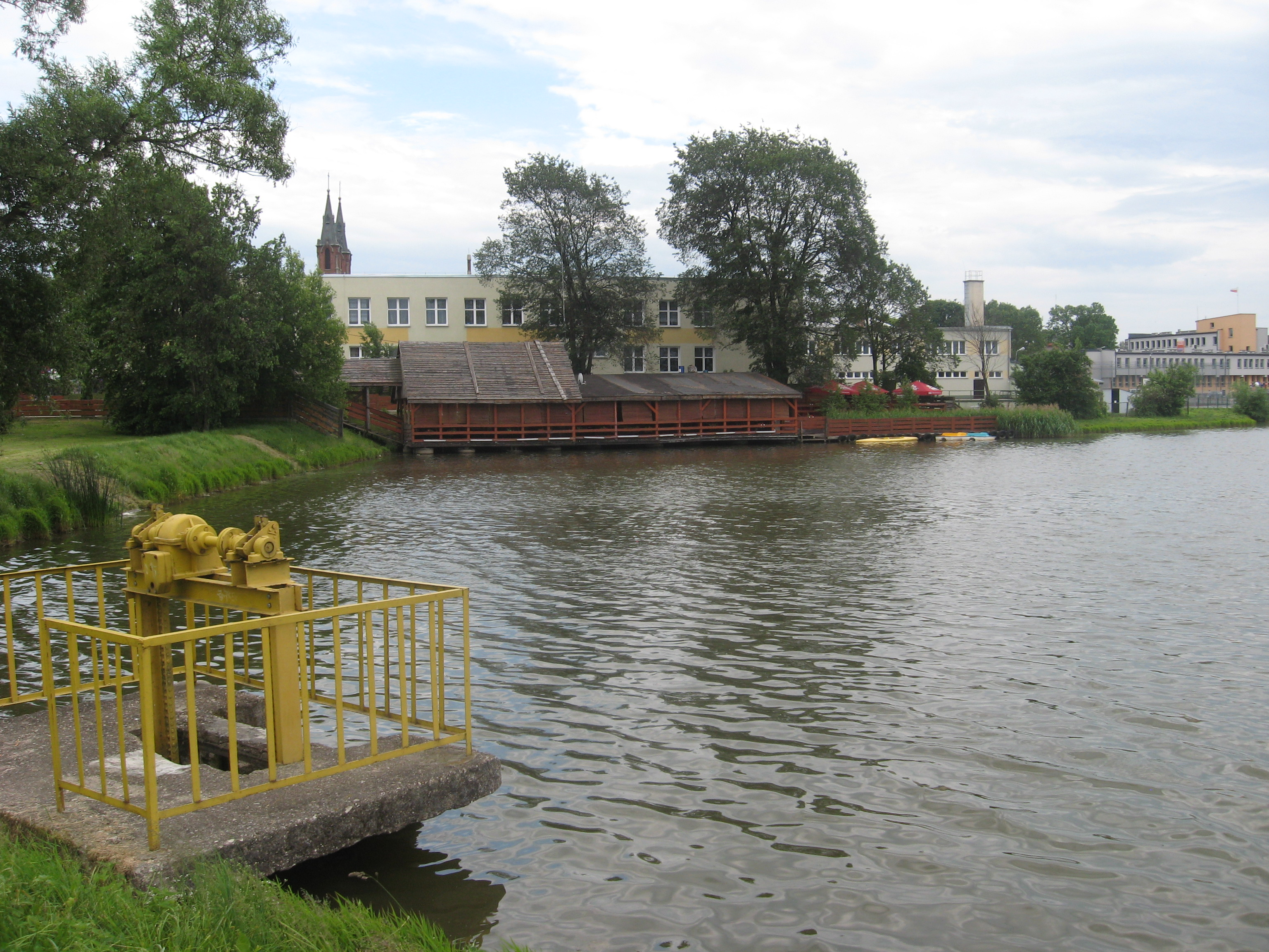 Zalew w Łosicach - widok z wału od strony Tocznej - widoczny budynek szkoły